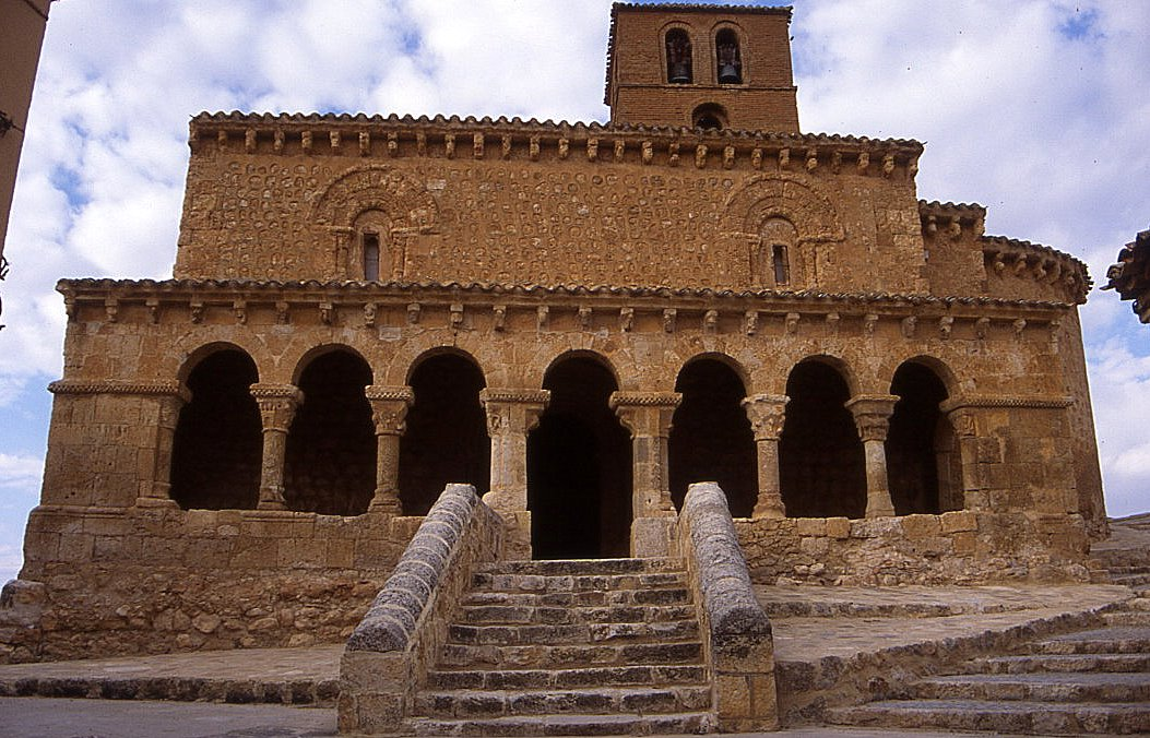 Iglesia románica de San Miguel, en la localidad soriana de San Esteban de Gormaz. Original en diapositiva de 35 mm. Tomada en abril de 2002.